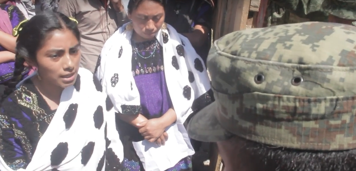 Ación de las mujeres de la Organización Sociedad Civil Las Abejas de Acteal, ante el campamento militar en la comunidad de Majomut, Chenalho, Chiapas. En el marco del Día Internacional de la Mujer. 08 de marzo de 2018.